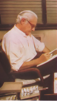 Fotografía del historietista argentino J.Luis Salinas.